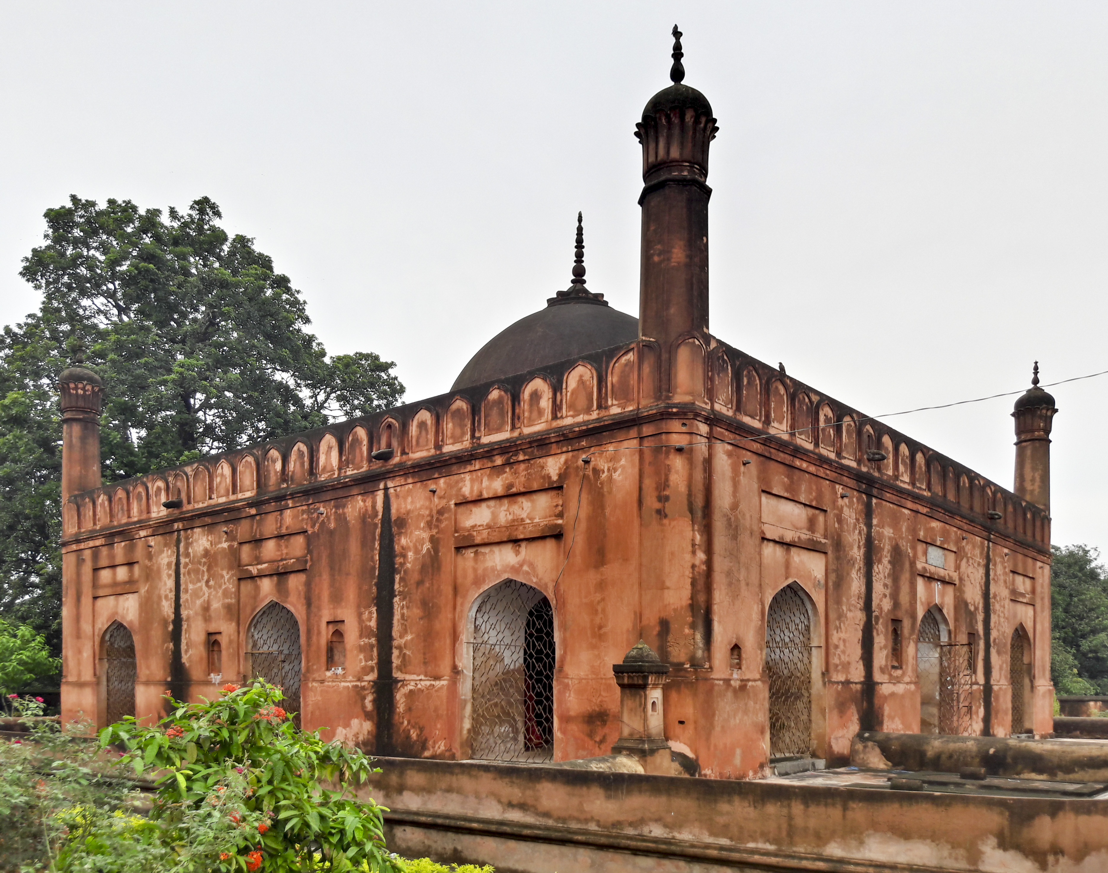 শাহ নেয়ামত উল্লাহ ওয়ালীর সমাধি মুঘল যুগের সর্বপ্রথম সমাধি স্থাপত্য নিদর্শন বলে বিবেচনা করা হয়। এটি বাংলাদেশ প্রত্নতত্ত্ব অধিদপ্তর এর তালিকাভুক্ত একটি প্রত্নতাত্ত্বিক স্থাপনা।